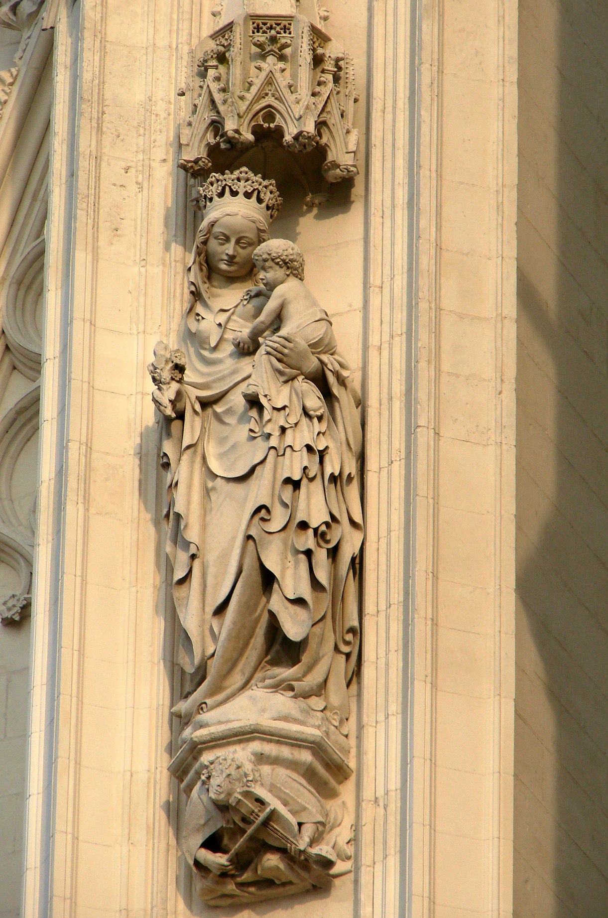 Vierge à l'Enfant (contrefort de la tour Nord), cathédrale d'Amiens (Somme).